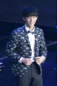 160409 深圳 音乐风云榜 -吴磊- -朴宝剑- -钟汉良- 9P